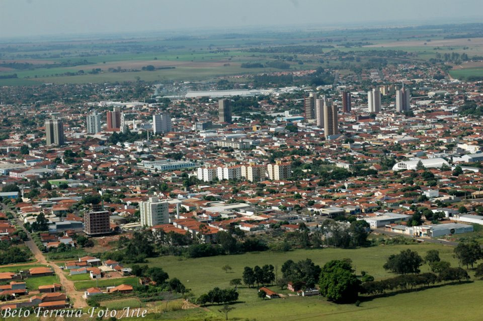 Cidade de Birigui - SP